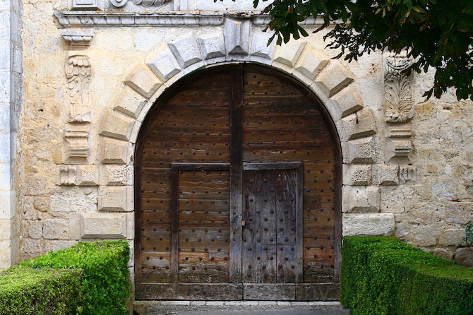 Porte du château de Gramont (Tarn-et-Garonne, France).